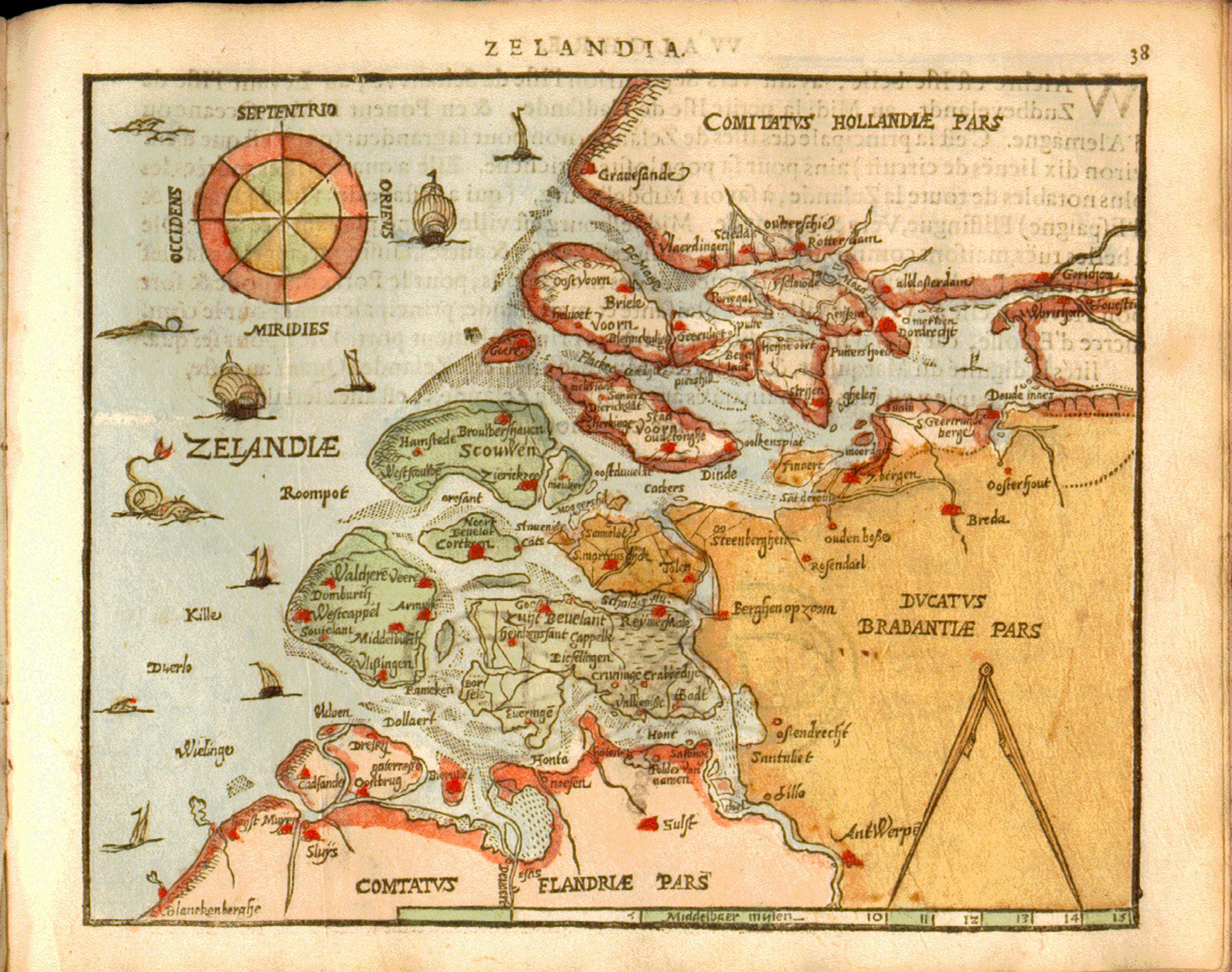 title=Zelandia/Zelandiæ; size=16x20cm; Miroir du Monde=Spieghel der Werelt,uitgegeven door Zacharias Heyns